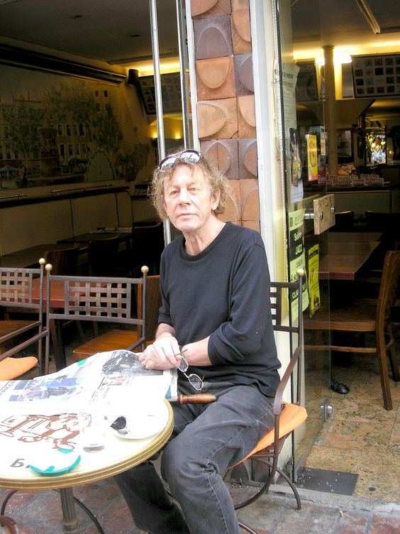 Le guitariste, bassiste et chanteur britannique, Kevin Ayers (1944-2013) à la terrasse de la brasserie "Chez Félix", place Carnot à Carcassonne en septembre 2009.